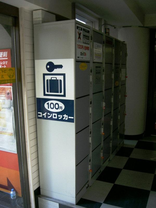 Coin locker, Tokyo, japan